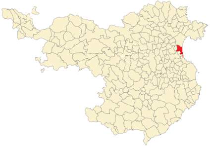 Situación de Sant Pere Pescador en la provincia de Gerona.